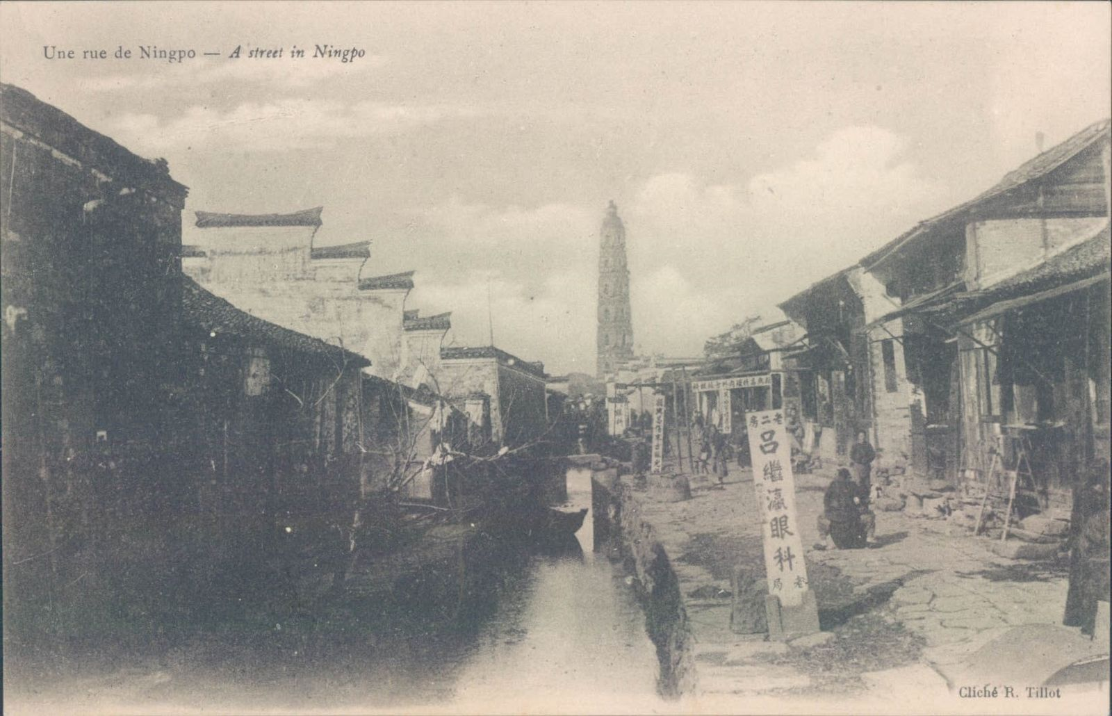 宁波街景，远景为天封塔